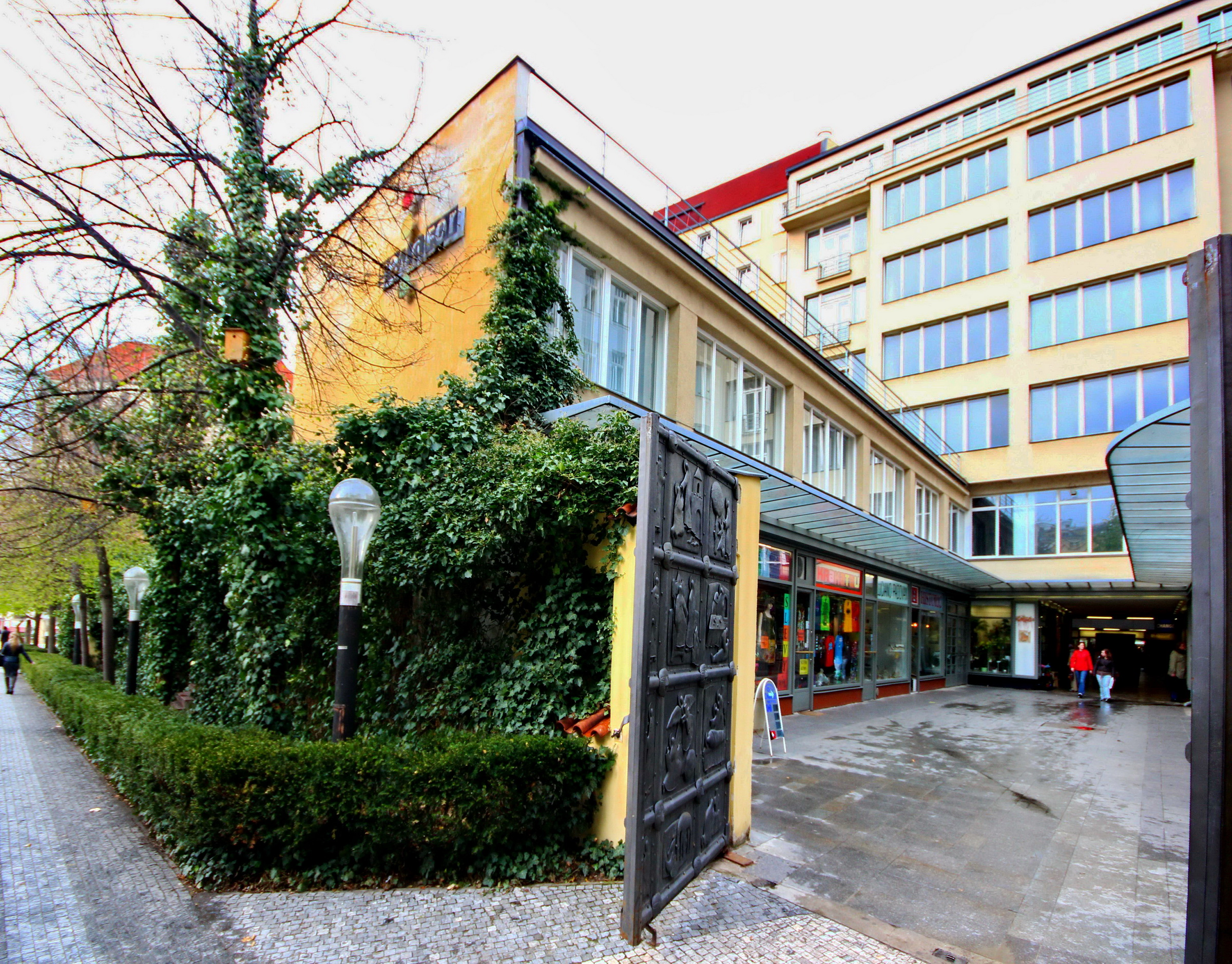 Přístavba paláce Alfa, Praha. V letech 1961 - 1993 zde sísdlilo divadlo Semafor.